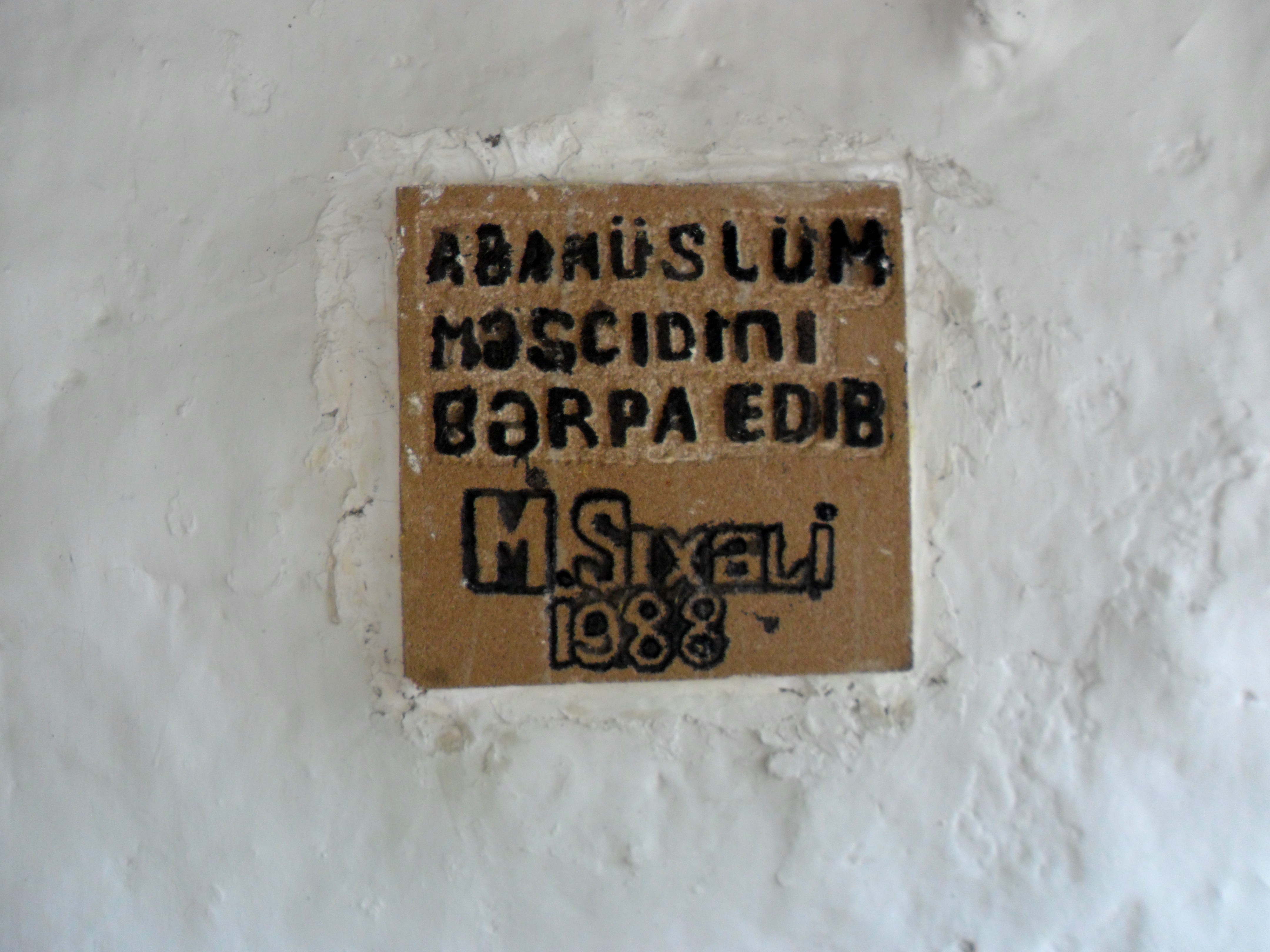 Əbu Müslim məscidi (Cek)